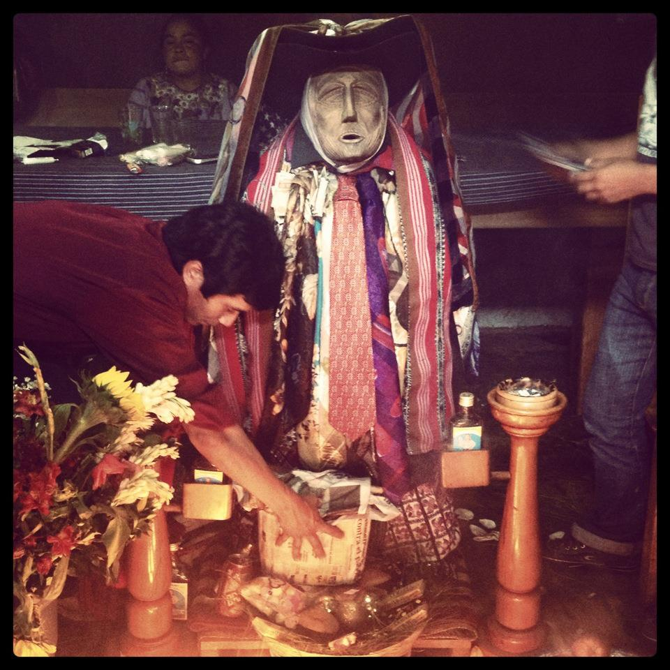 Rilaj Mam